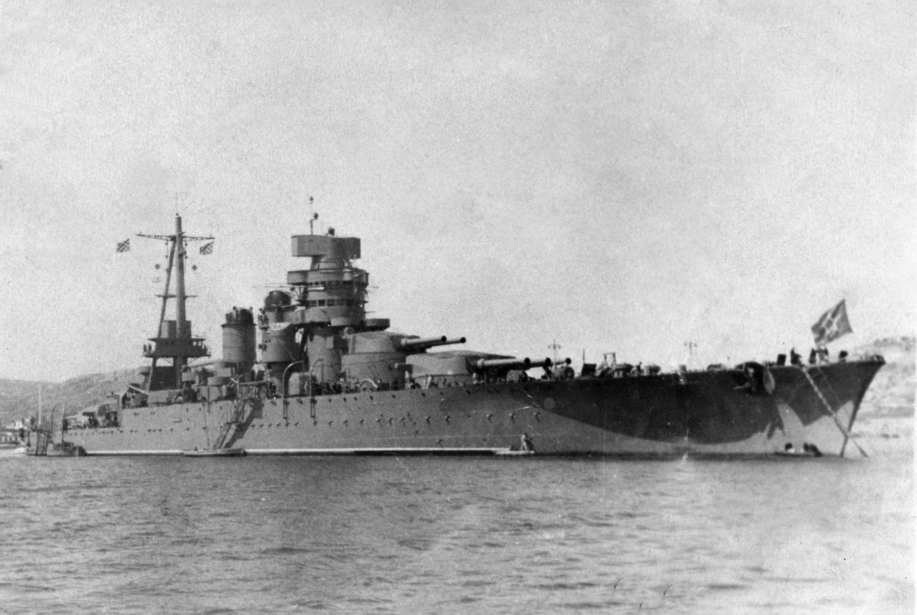 Линейный корабль Новороссийск в Севастополе, начало 1950-х годов.